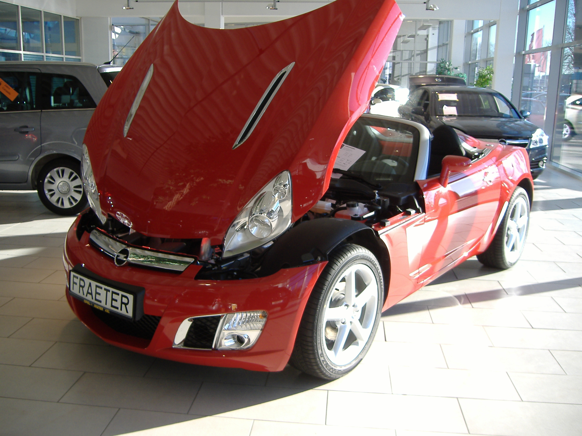 Opel GT Roadster offene Motorhaube